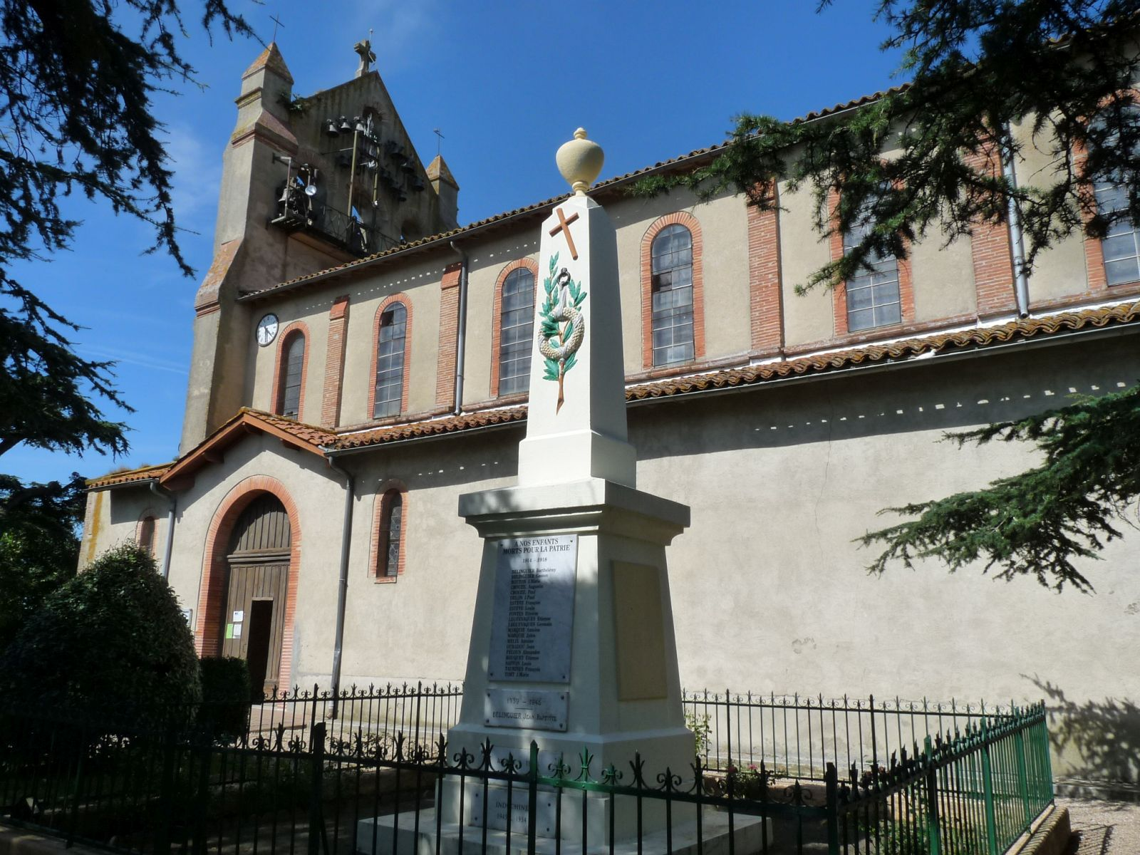 Eglise et monument aux morts de Lagarde, Haute-Garonne, France